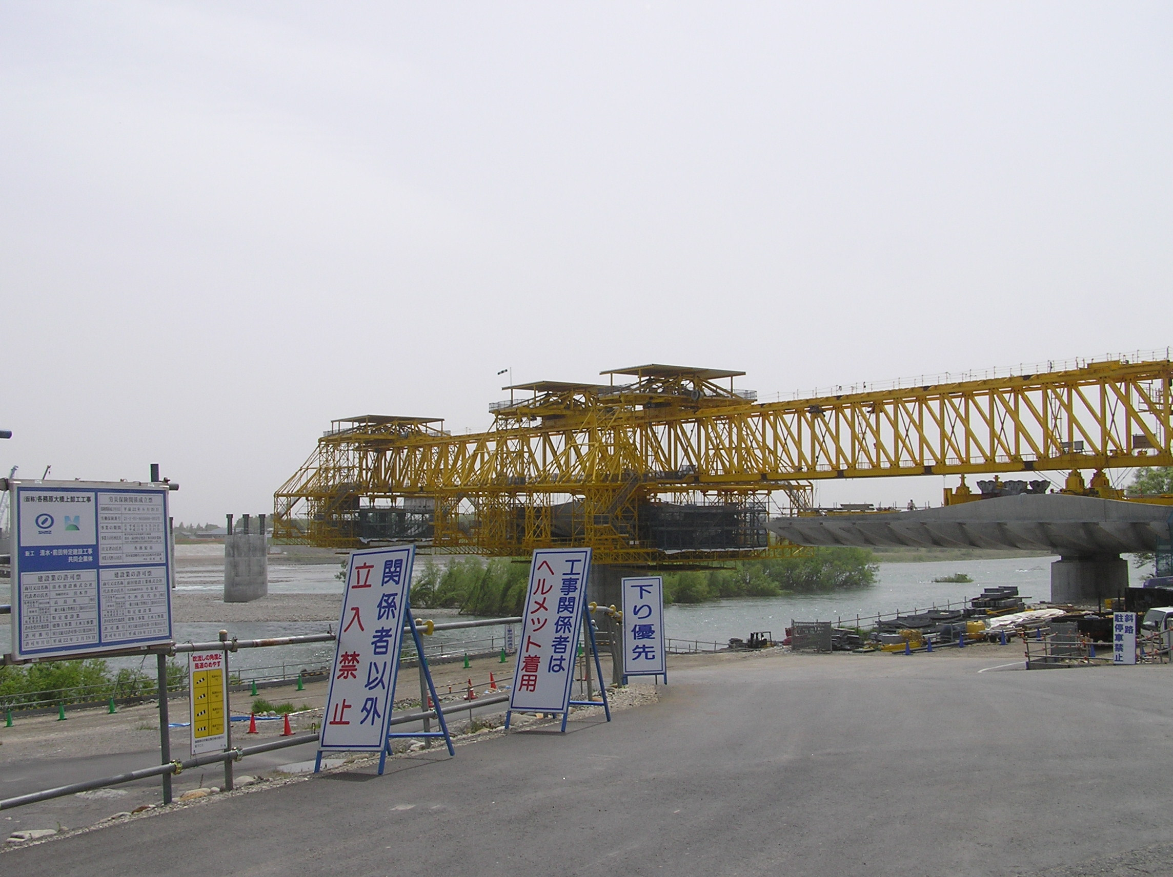 建設中の各務原大橋(岐阜県各務原市)